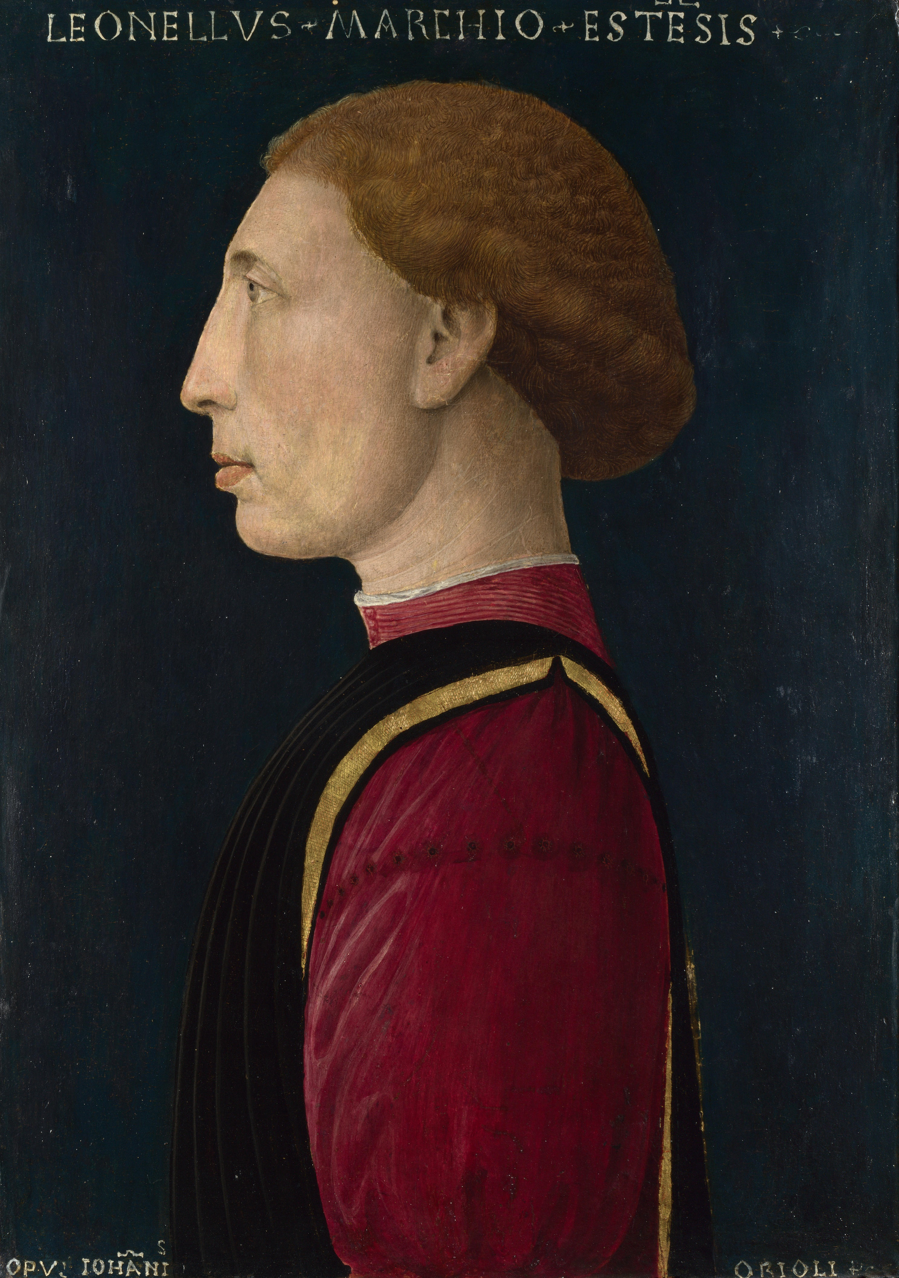 Lionello d'Este